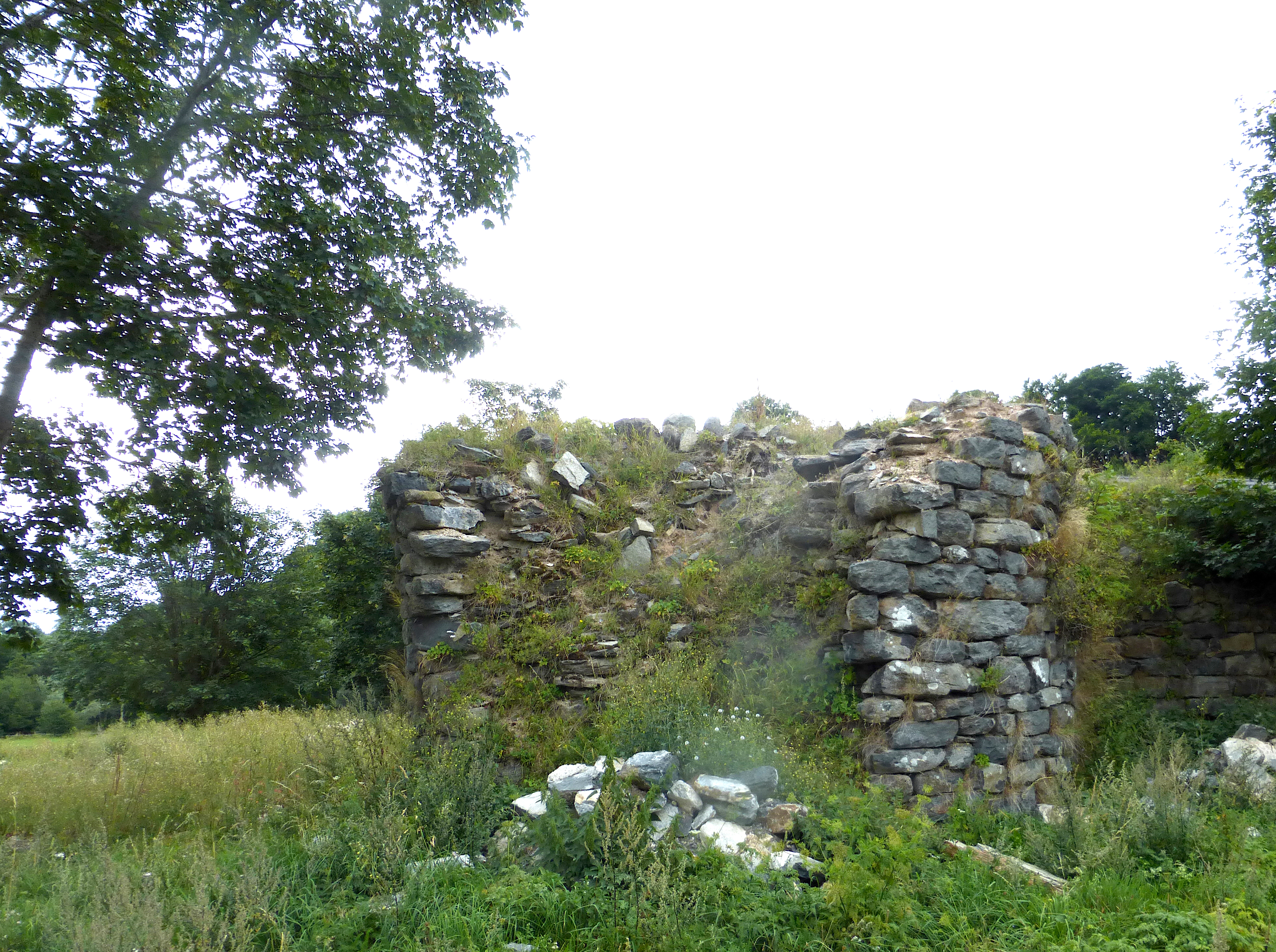 Les Ruines du Château de la Bastie, ancienne résidence de la famille de Bayle de la Bastie. Chaudeyrolles (Haute-Loire) Août 2017